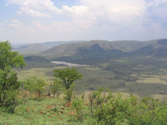 Hügellandschaft im Pilanesberg National Park